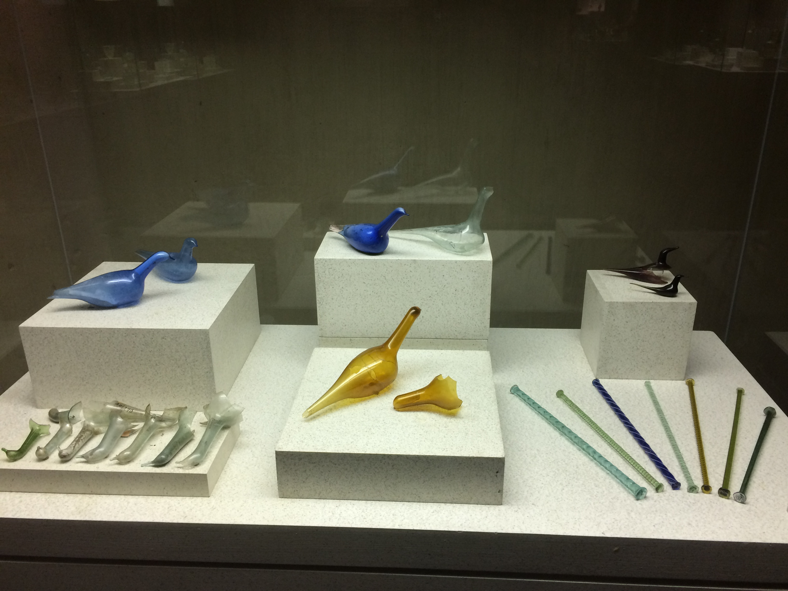 Museo civico e archeologico Locarno (Schweiz), Glas aus der Römerzeit